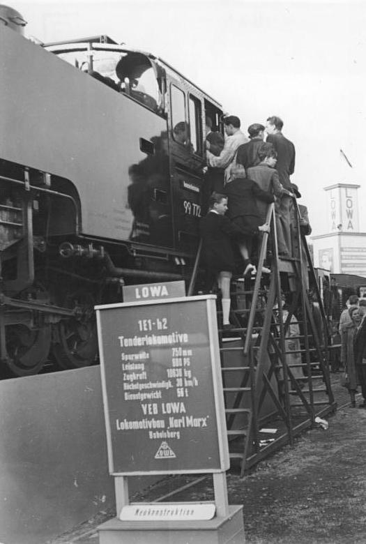 Leipziger Messe, Dampflok 99 772 (BR 99) Leipziger Messe 1952 - Schaufenster des friedlichen Aufbaus. Vom 7. bis 17. September 1952 findet die internationale Leipziger Messe als grosse Technische Messe und Mustermesse in 13 Messehallen (75000 qm) auf einem ausgedehnten Freigelände (25000 qm) und in 15 Messehäusern (80.000 qm) statt. Messebesucher besichtigen eine Tenderlokomotive auf dem Lowa-Freigelände. Zentralbild-Quasch. Me-So. 16.9.1952